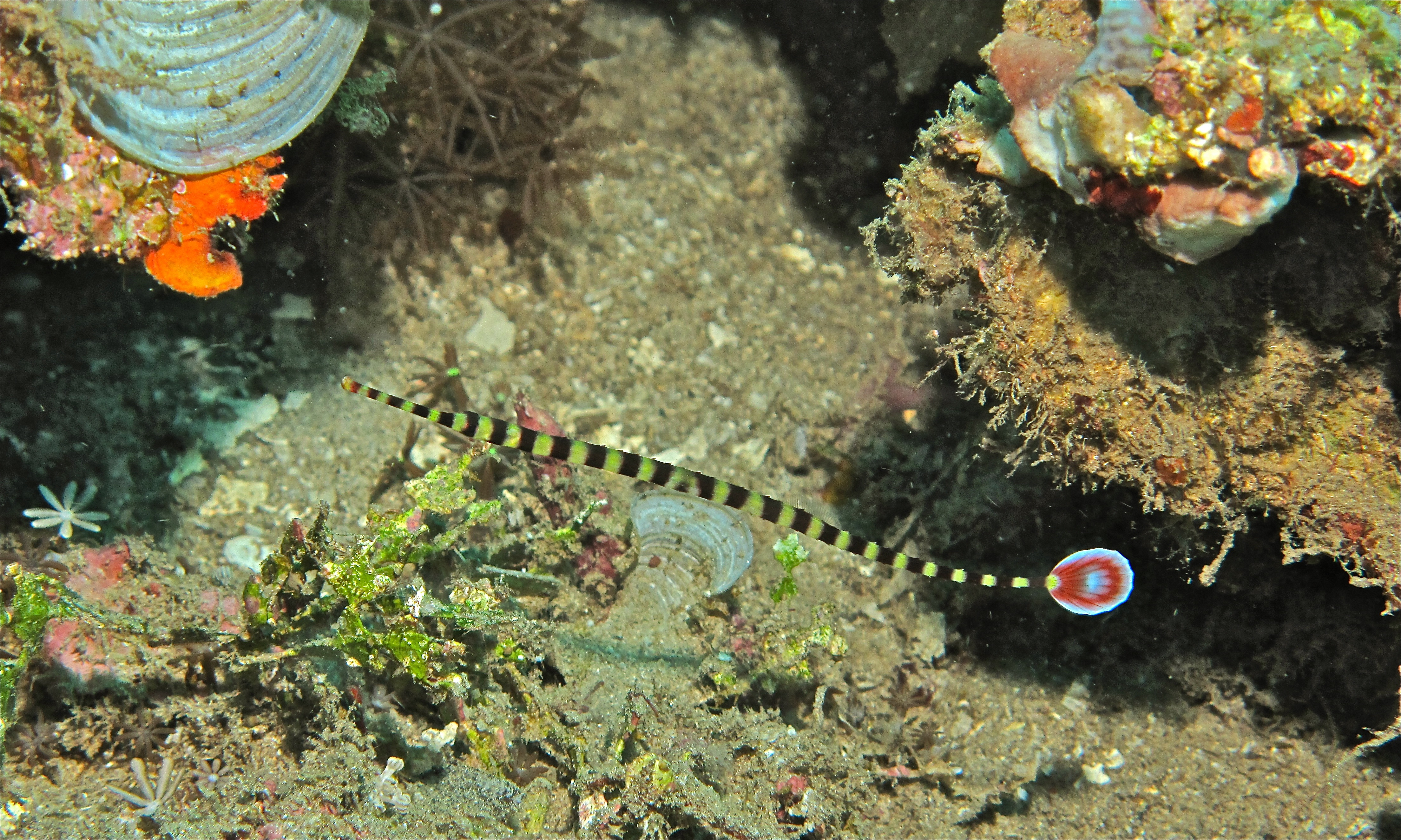 Wori I Manado, Sulawesi, INDONESIA